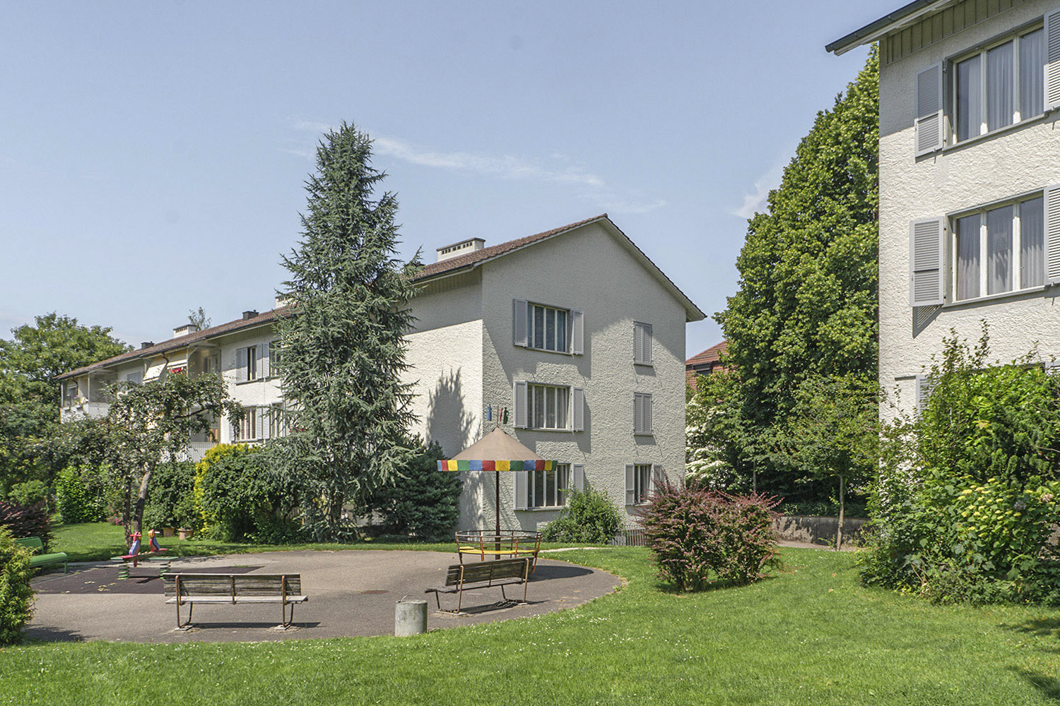 Bern, Siedlung Meienegg, 1949–1955, Hans und Gret Reinhard